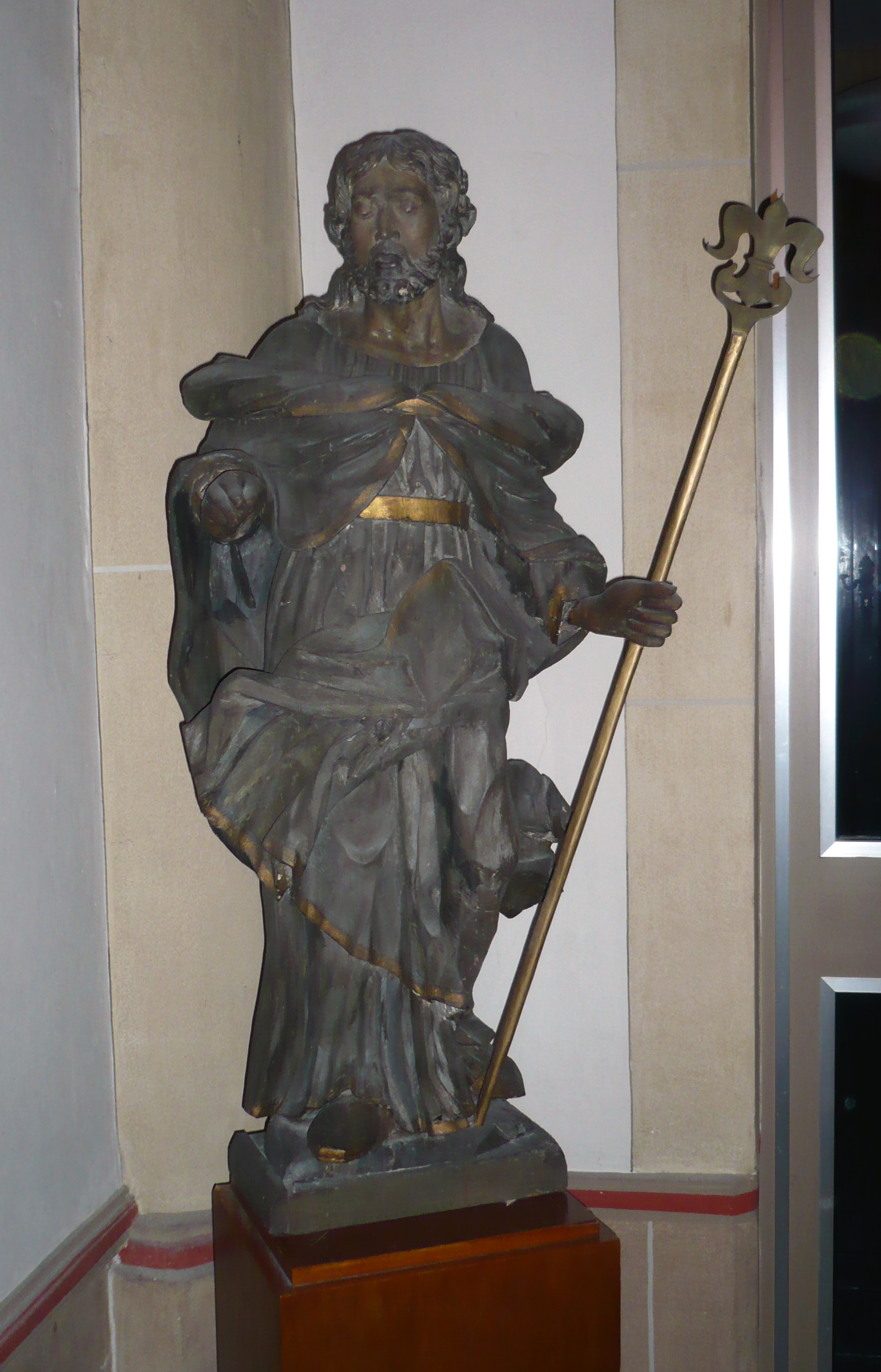 Holzskulptur des hl. Josel in der Kirche St. Nikolaus, Orsoy.